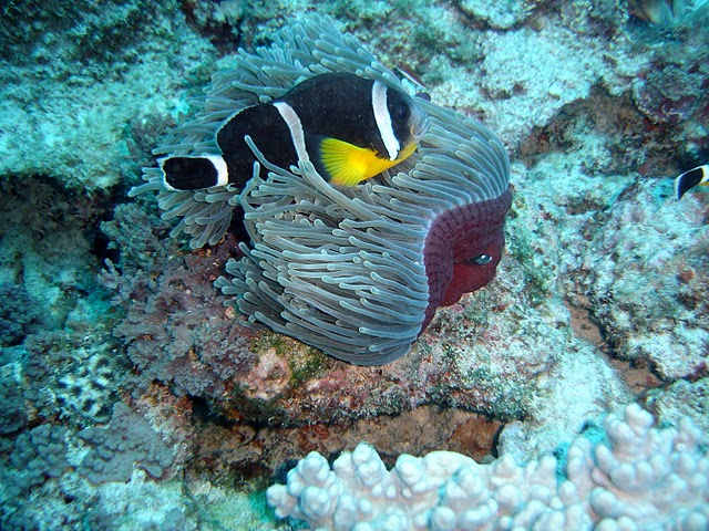 Mauritius-Anemonenfisch (Amphiprion chrysogaster Cuvier, 1830)